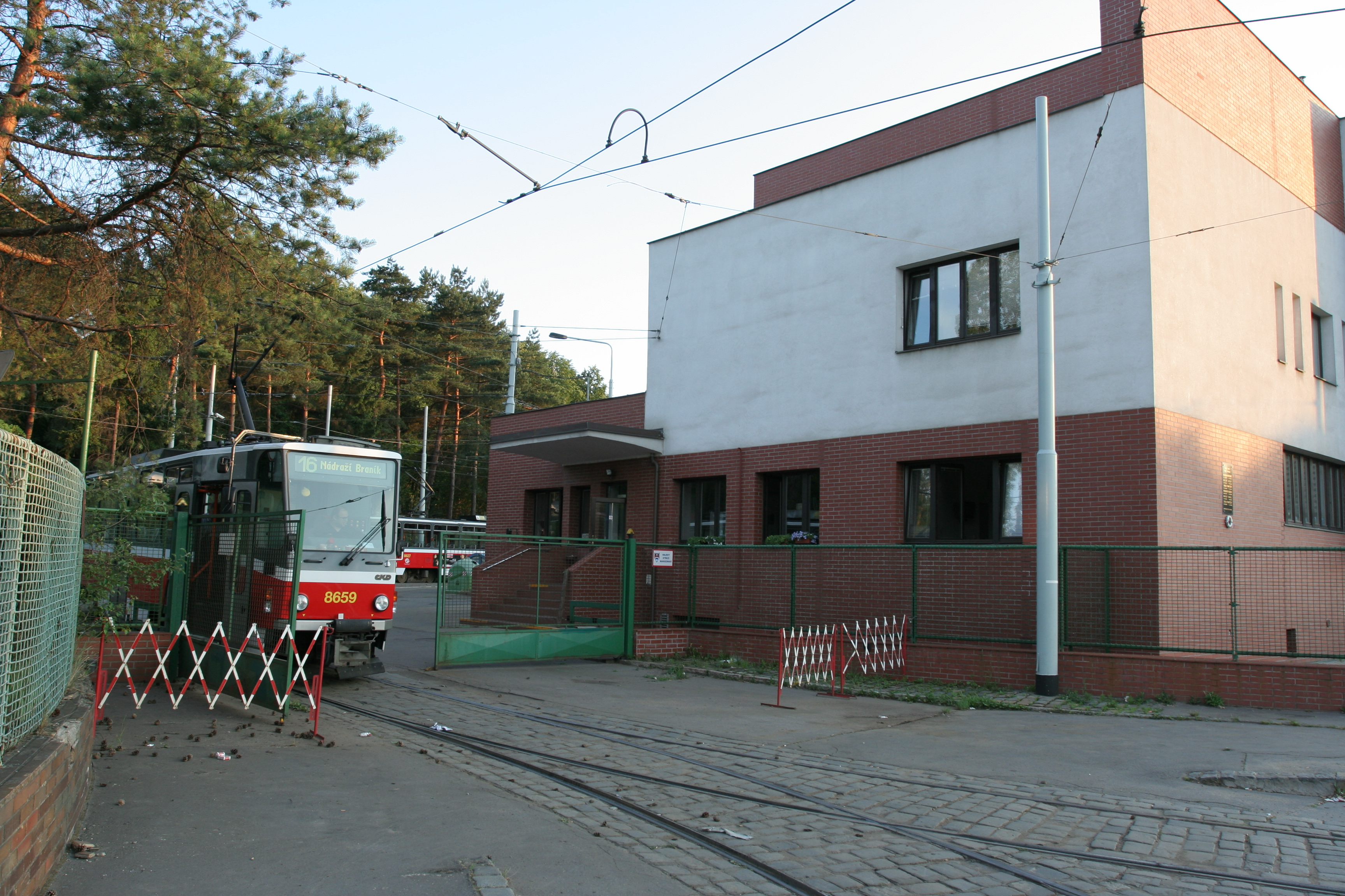 Gate of Vozovna Motol, Praha